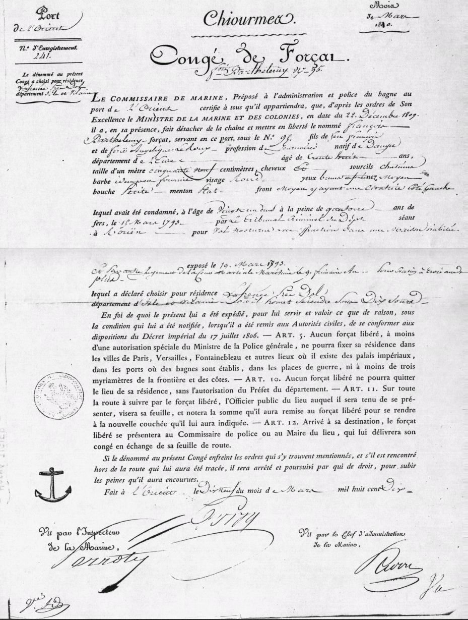 Congé de bagnard ou forçat ayant exécuté sa peine, délivré à l'intéressé à Lorient en 1810 pour qu'il puisse se rendre dans sa commune. Document de format A3.